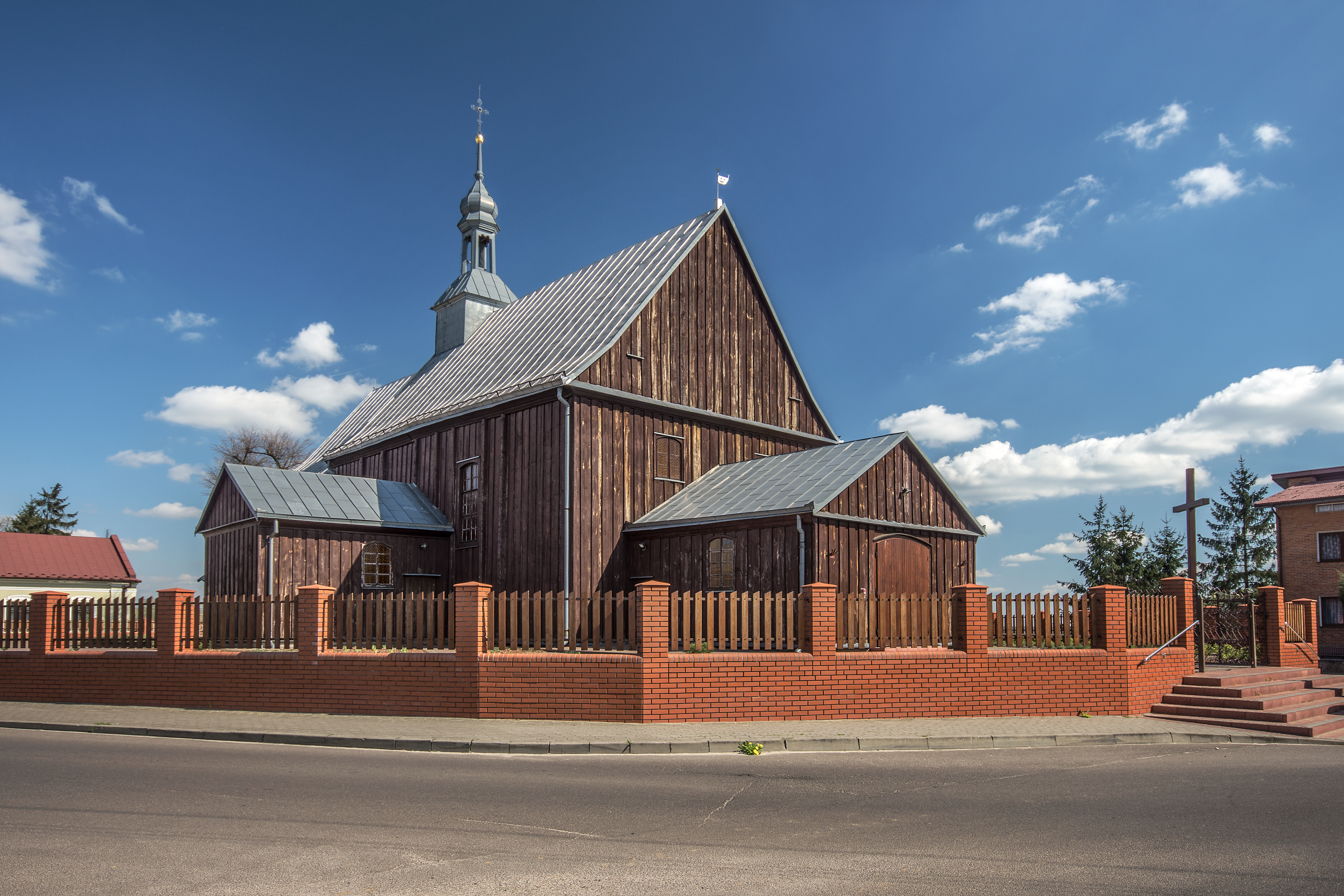 Godziesze Wielkie, kościół par. p.w. św. Bartłomieja, 1781-1782